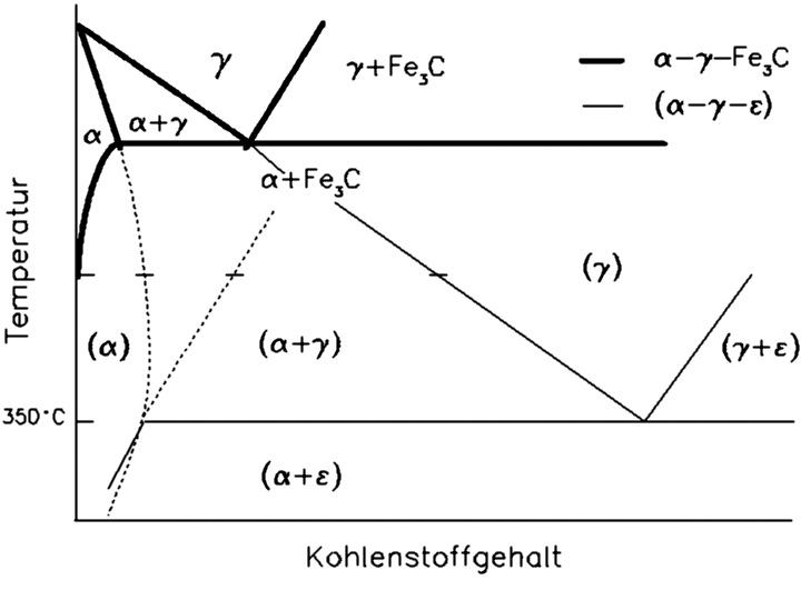 Bild 2.19 Schematisches Fe-Fe3C-Diagramm mit eingezeichnetem metastabilen Fe-ε-Karbid-Diagramm